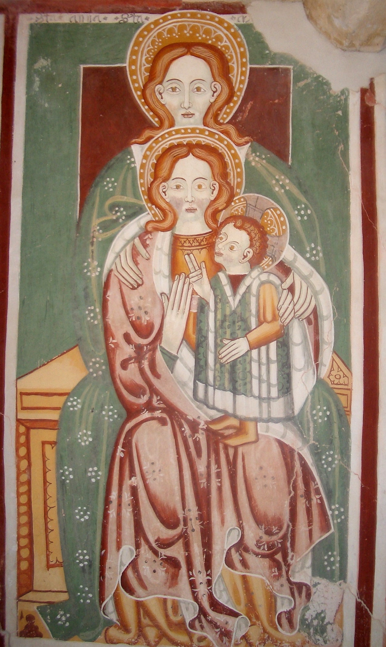 Unknown painter of XV century, St. Anna Metterza, fresco, 1450 ca, Oratorio di San Lorenzo all’Alpe Seccio, Boccioleto, Vercelli, Italy